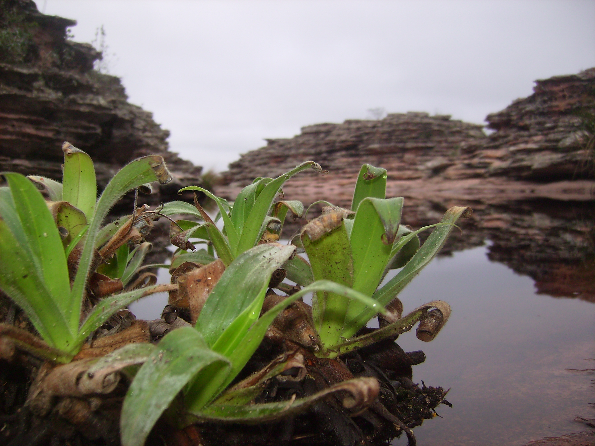 Morro do Chapéu, Cachoeira do Ferro Doido, Bahia/BA, Brasil